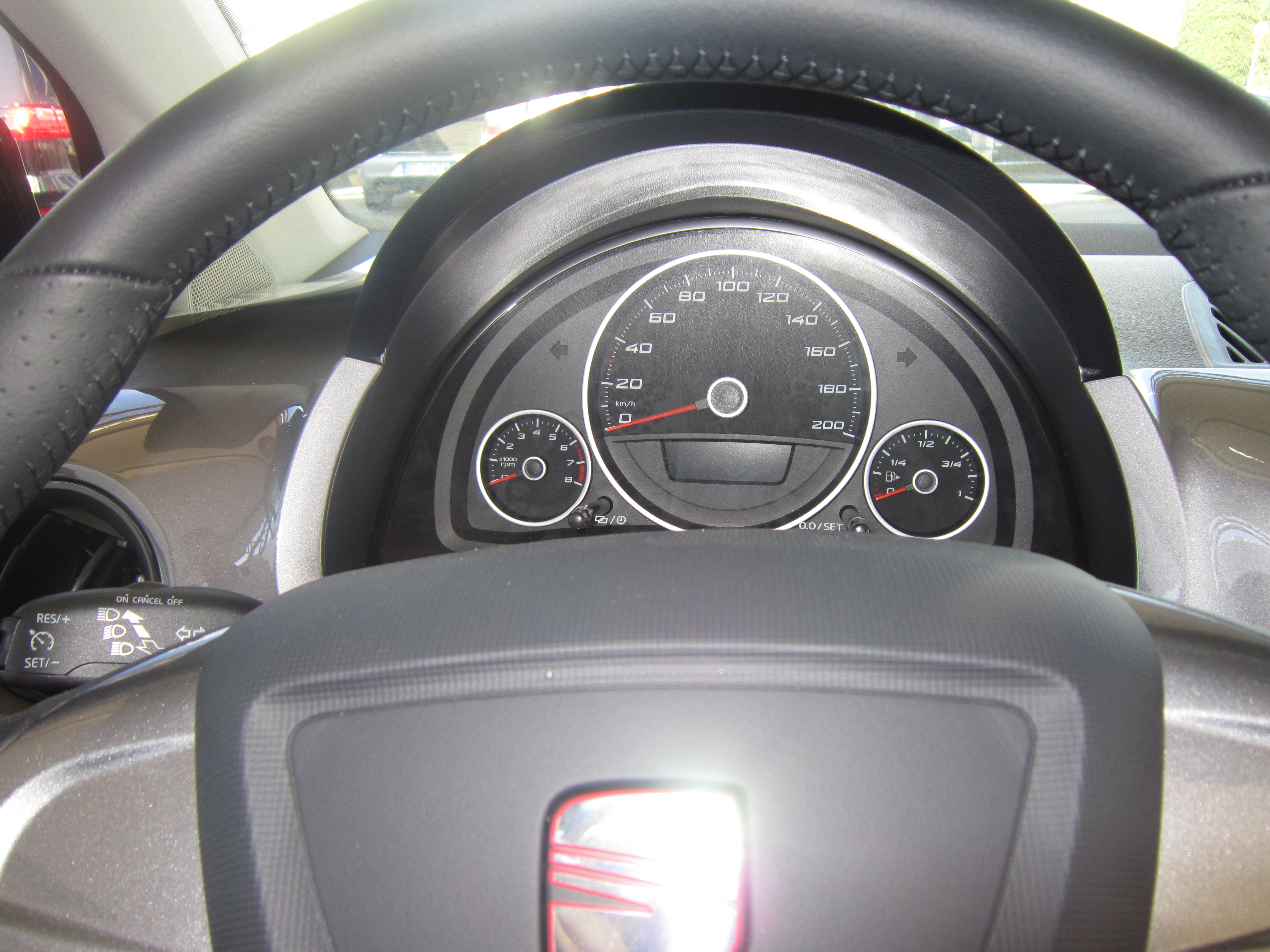 Il quadro strumenti della Seat Mii.